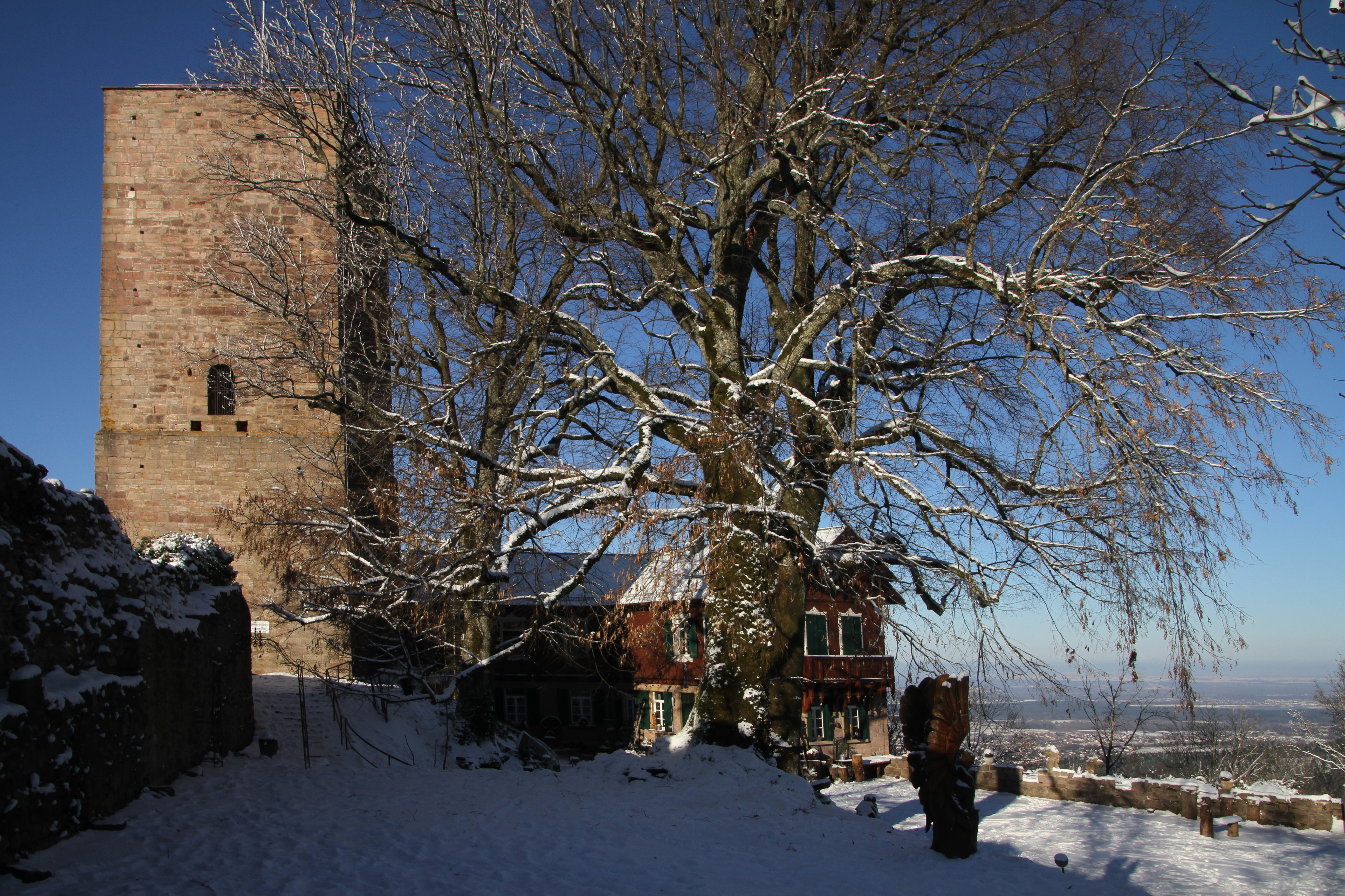 Burgruine Yburg im Baden-Badener Rebland.